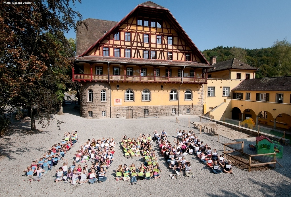 Logierhaus der International School of Schaffhausen